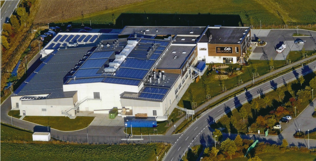 Luft